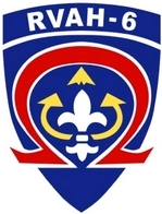 RVAH-6 insignia.